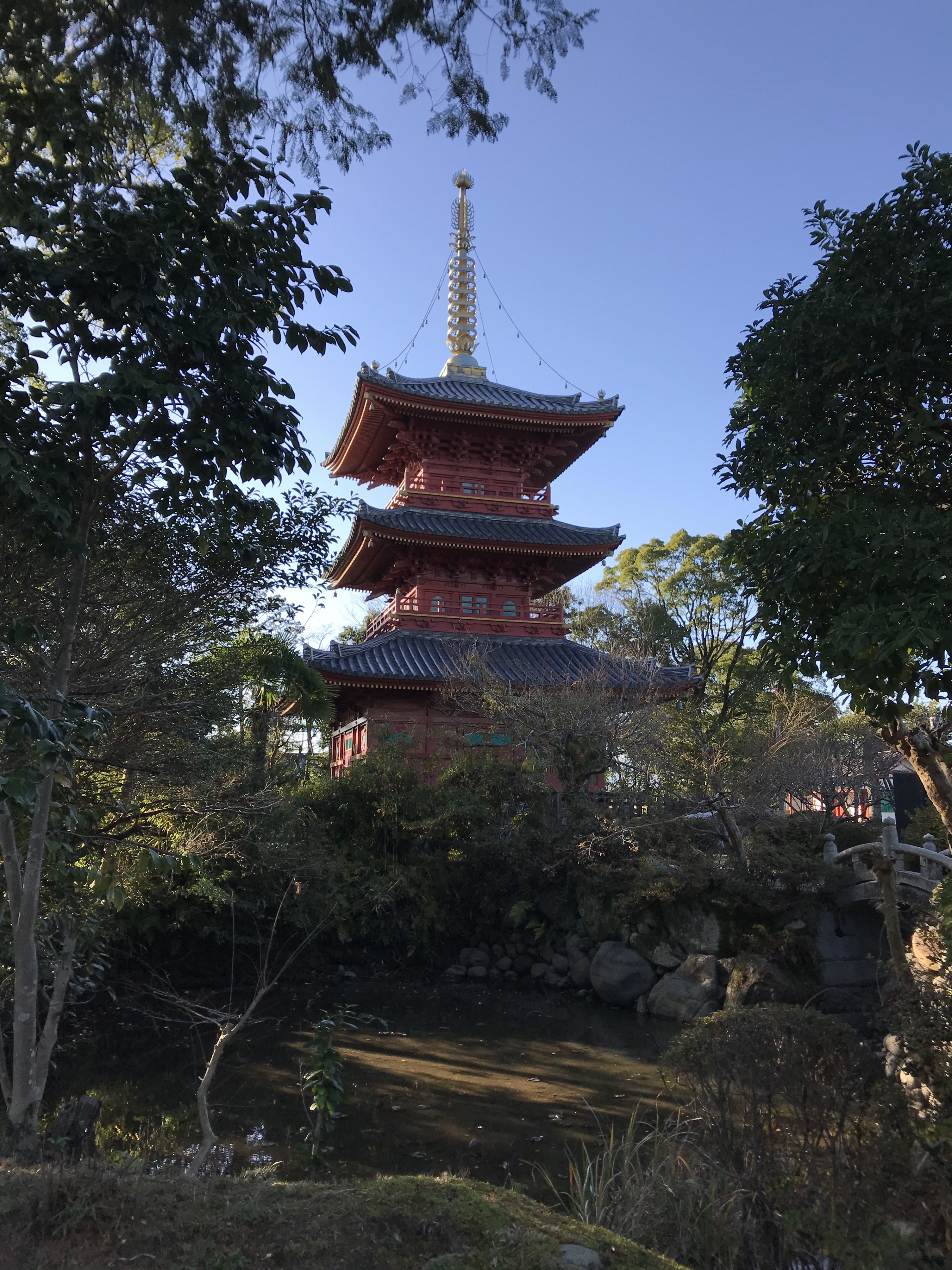 豊前国分寺・三重塔と池